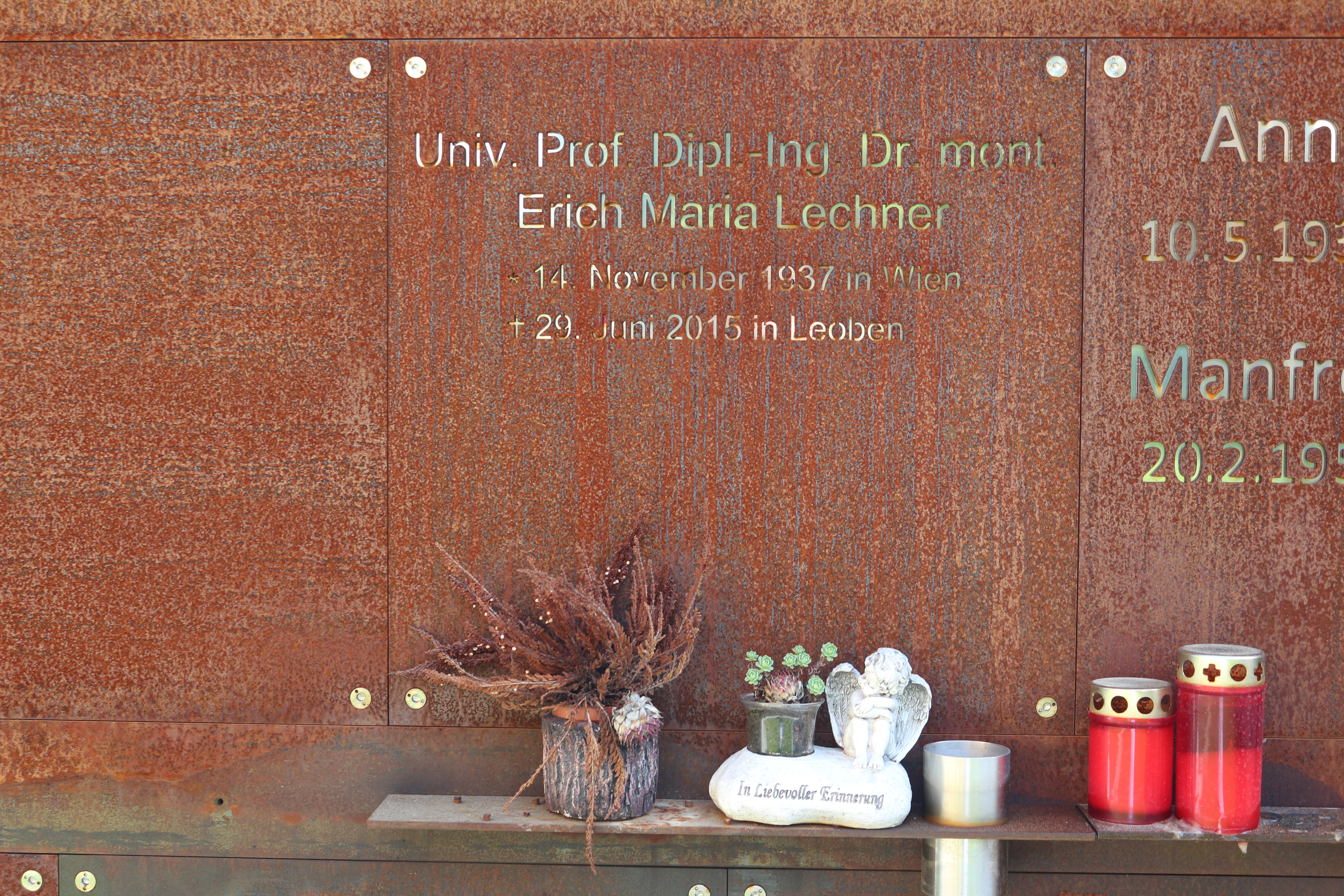 Urnengrab des Montanwissenschaftlers und Hochschullehrers Erich Lechner bei der Jakobikirche Leoben